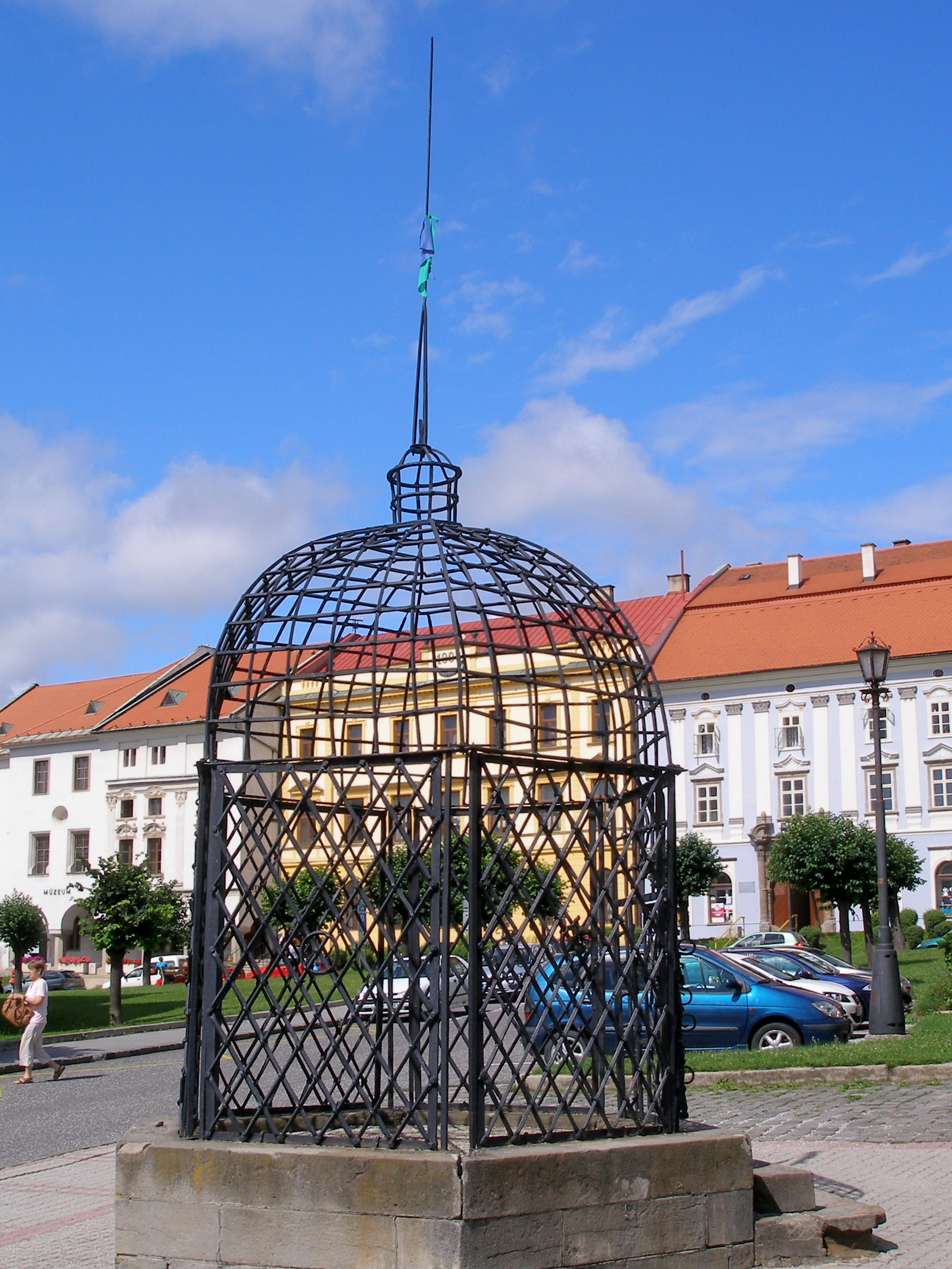 Klietka hanby v centre mesta Levoča.